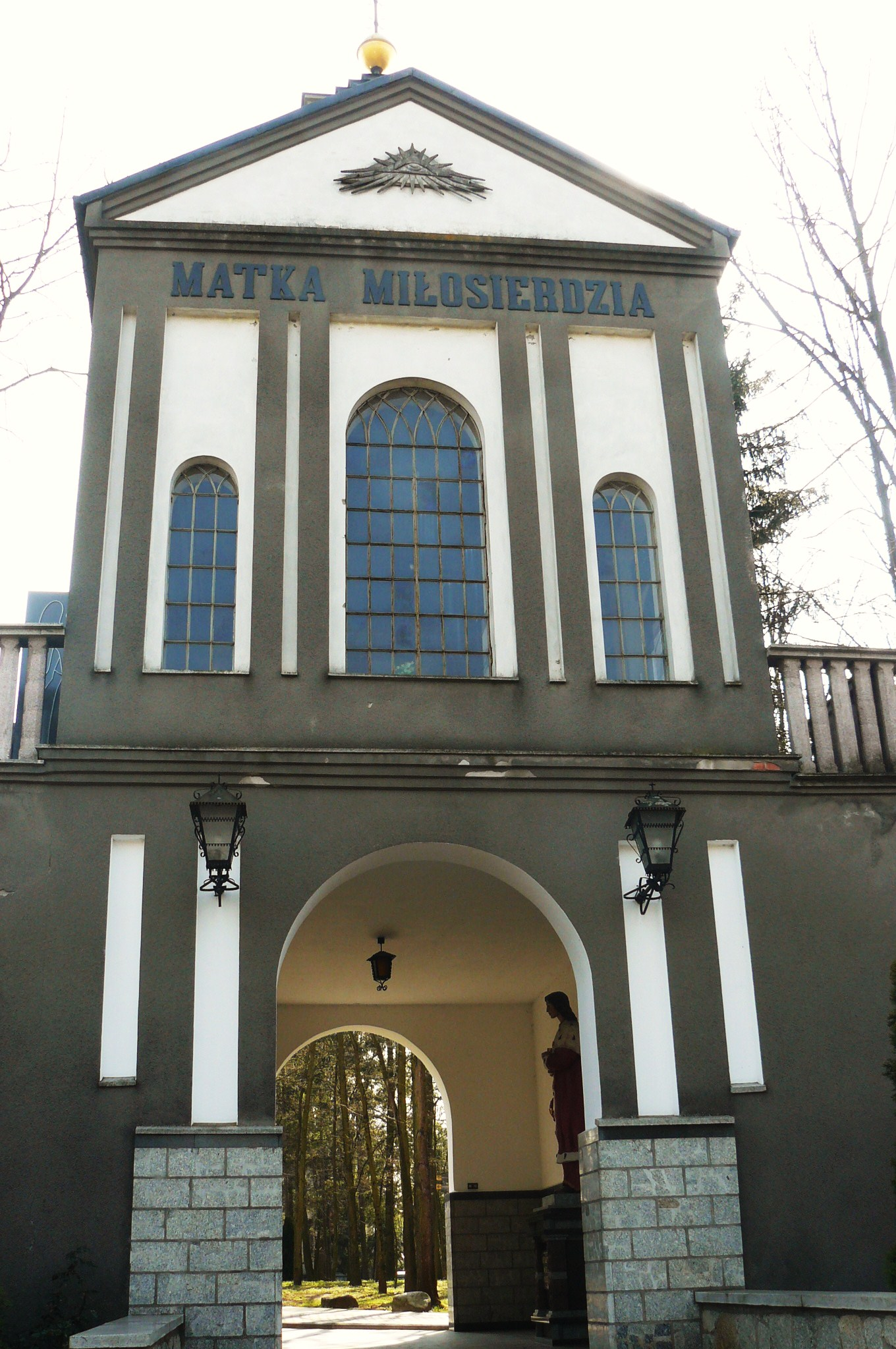 Kaplica Ostrobramska w Licheniu.